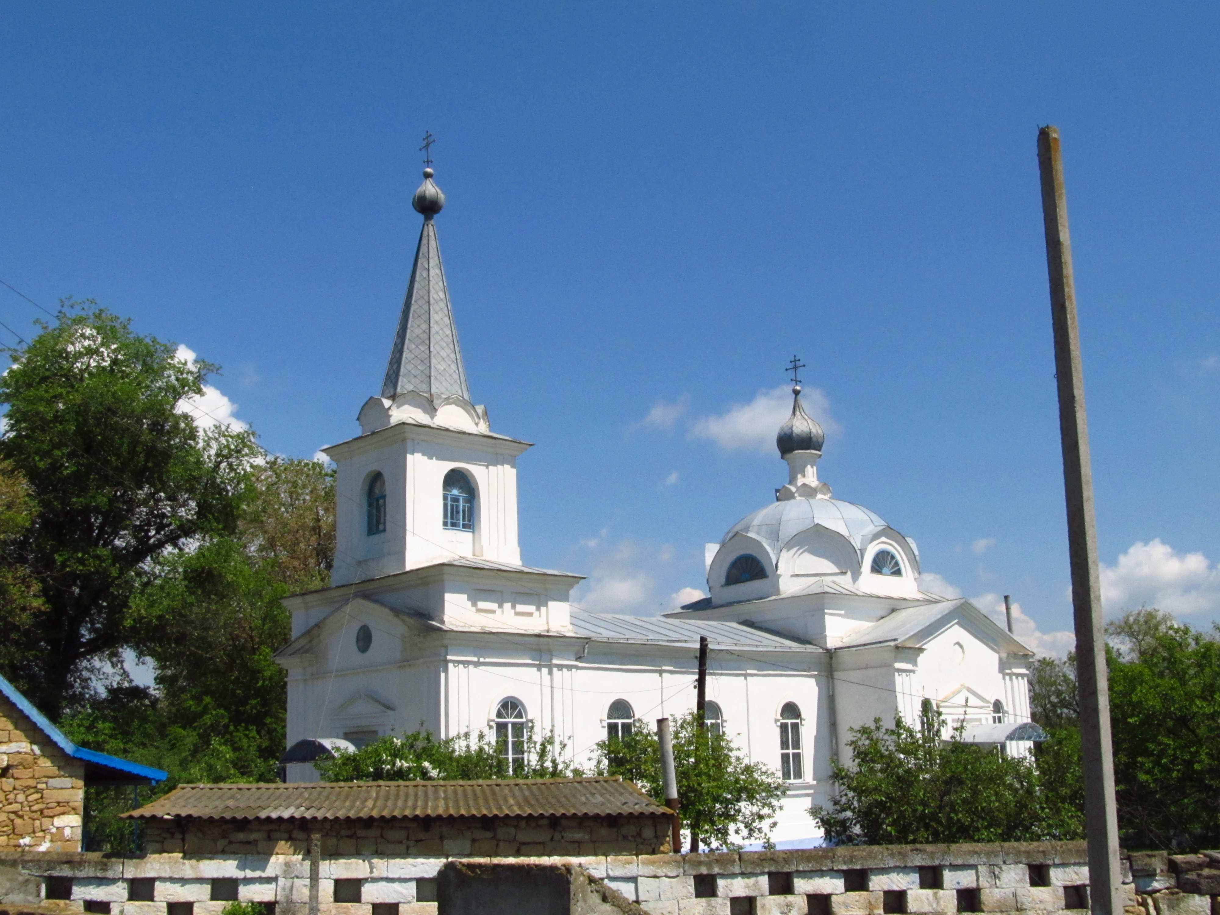 Церква Михайлівська, с. Кам'янське